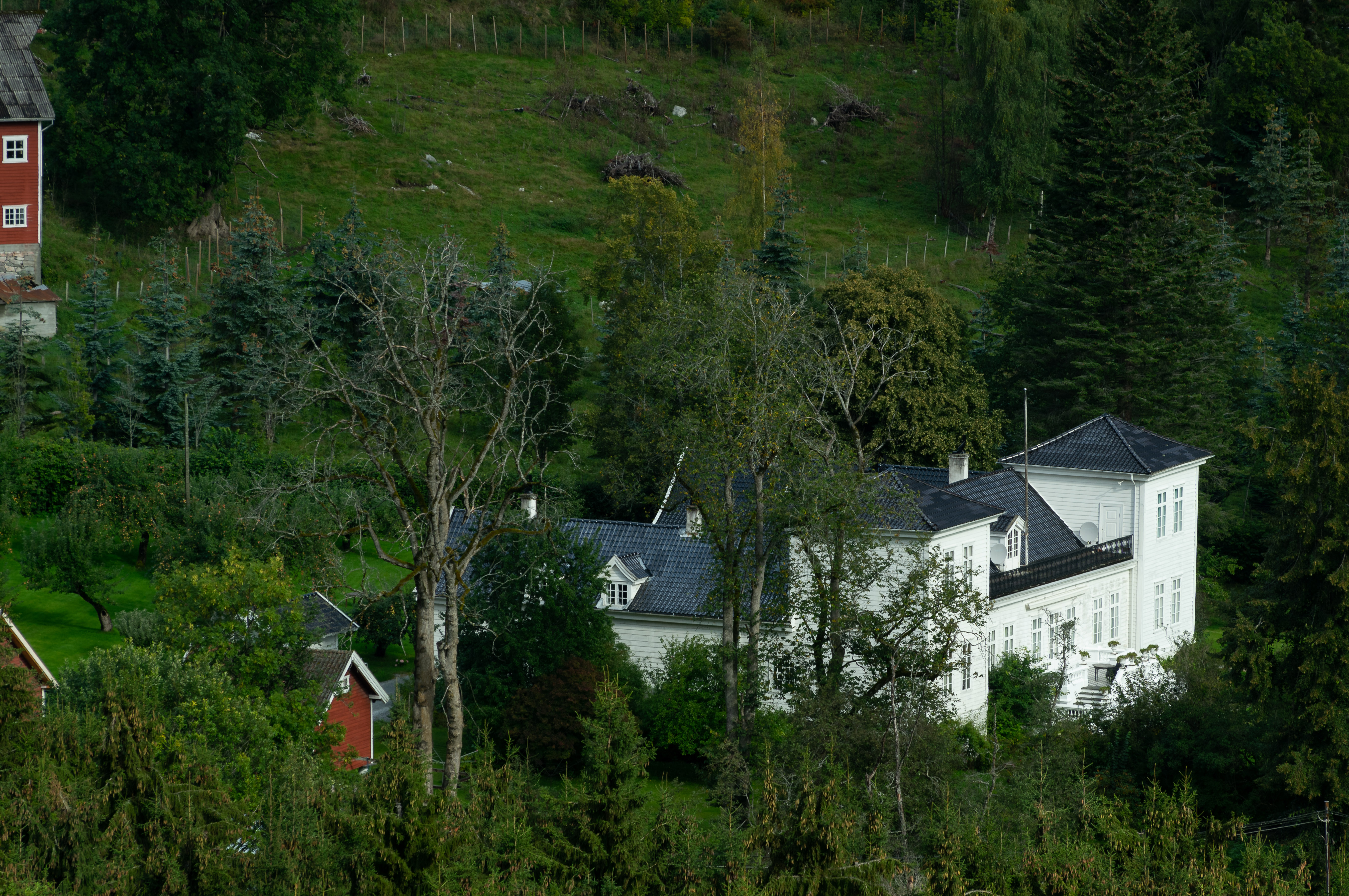 Kaupange hovedgård, hovudbygning.